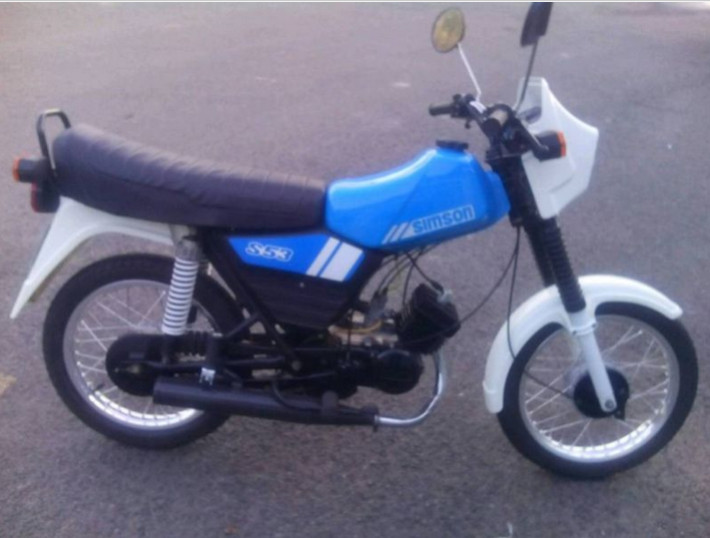 Mit freundlicher Genehmigung des Bildurhebers und Eigentümer des Fahrzeugs: Uwe Beulich